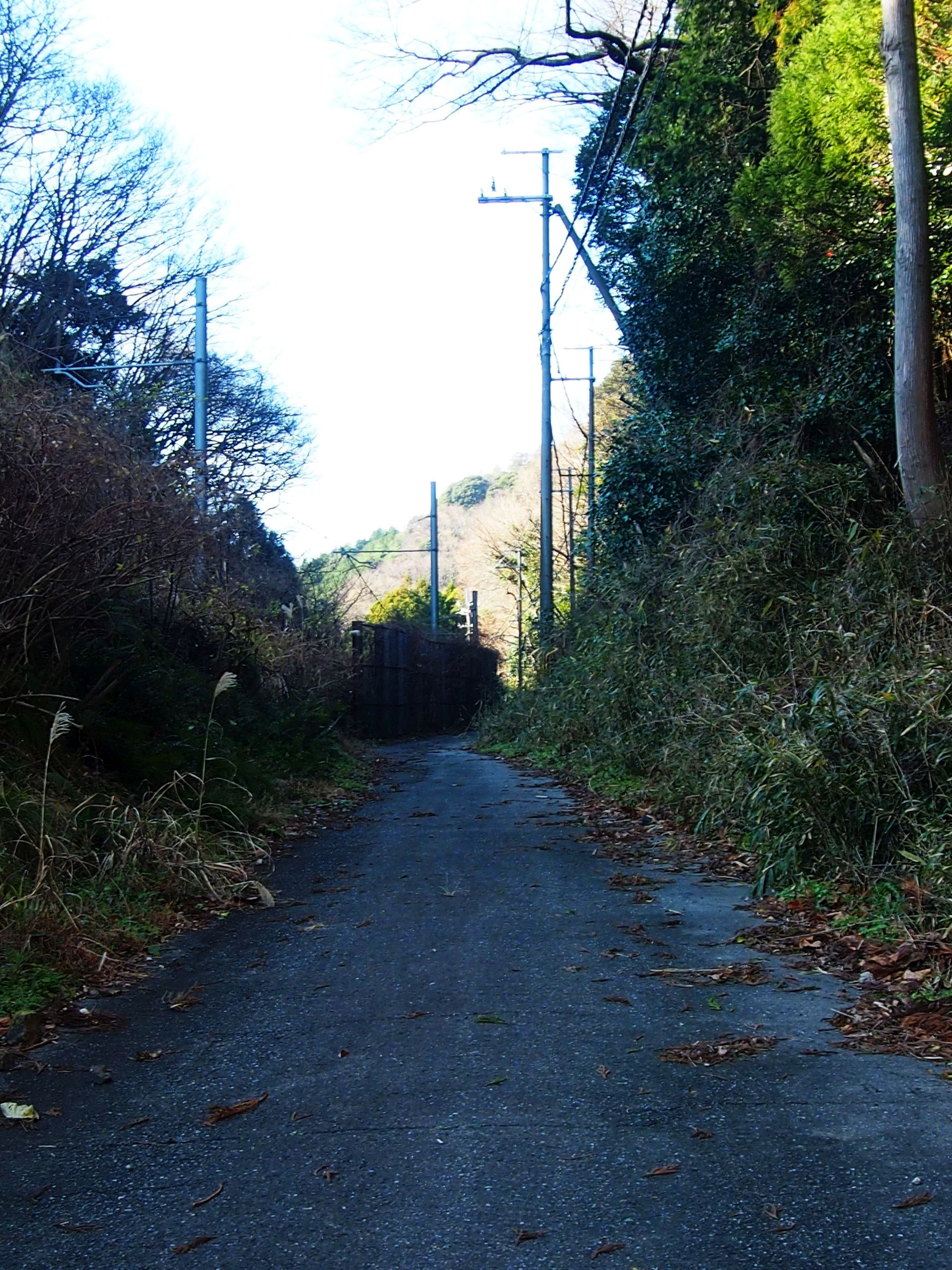 福井県美浜町の坂尻と佐柿を分ける峠。戦国時代の山城の国吉城が守る軍事上の要所であった。